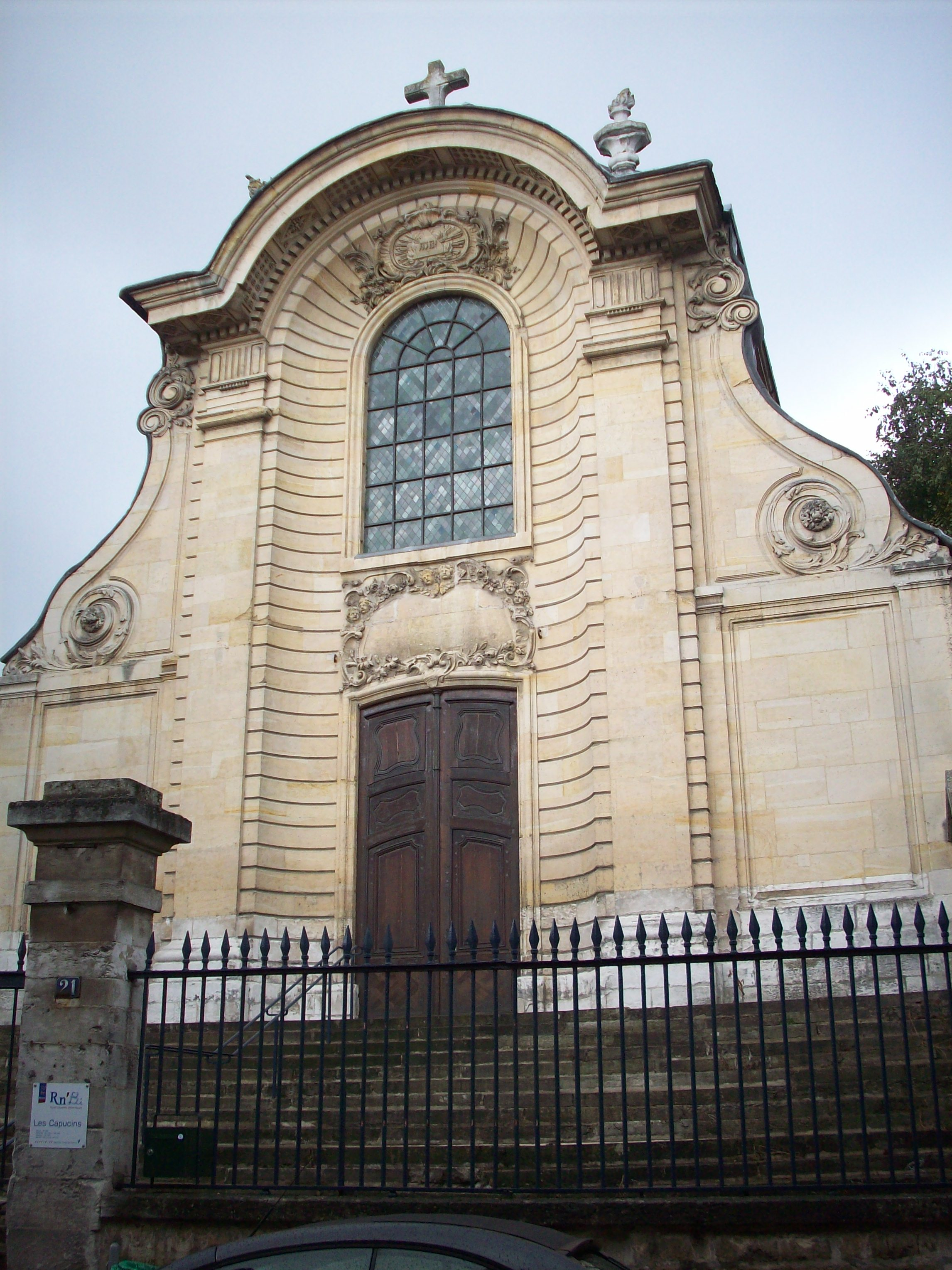 Façade de la chapelle du couvent des Ursulines, aujourd'hui bibliothèque dite des Capucins.